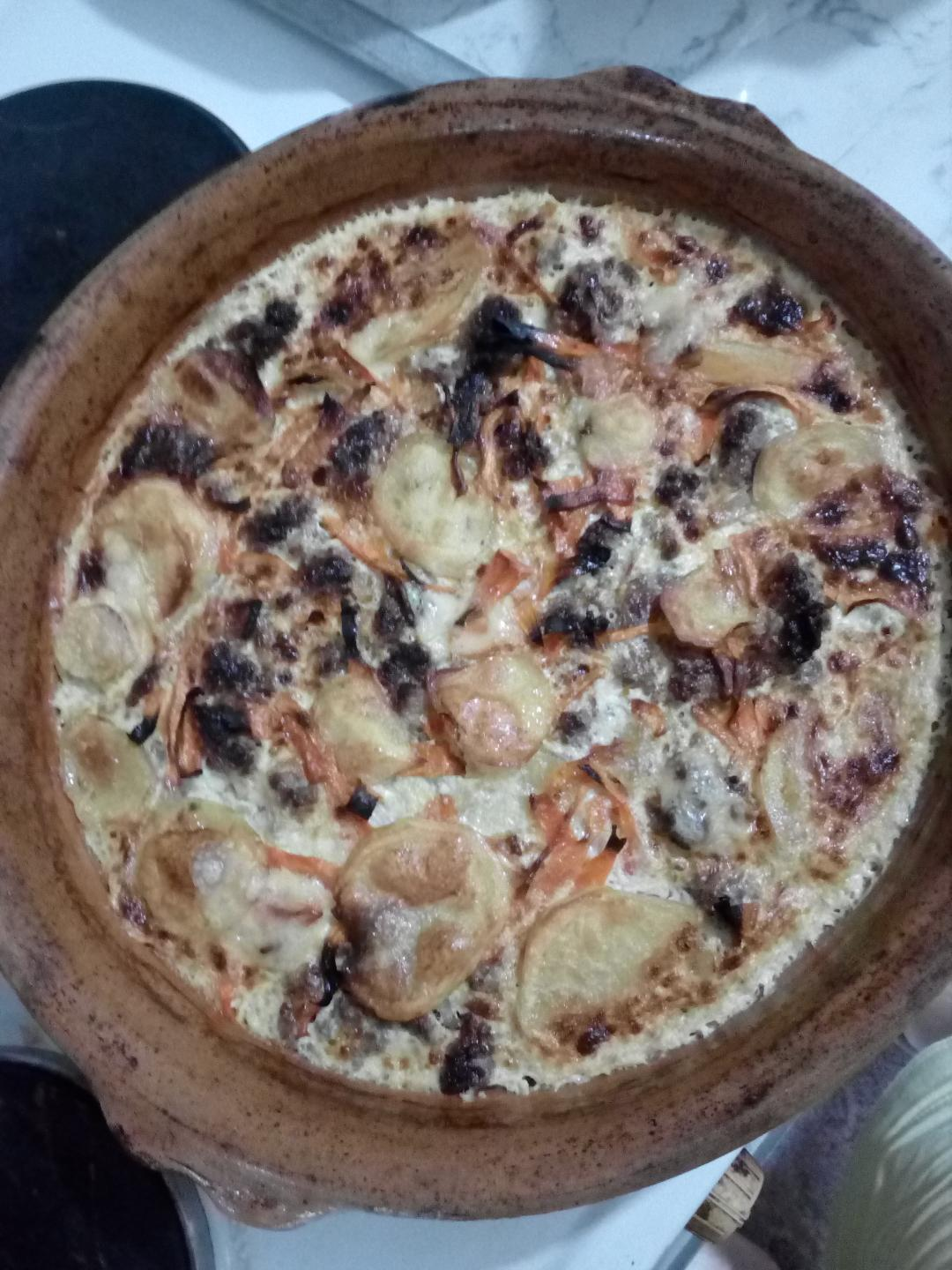 Македонска мусака